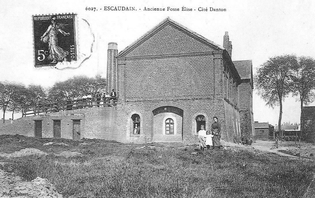 Fosse Elise d'Escaudain fermée en 1867